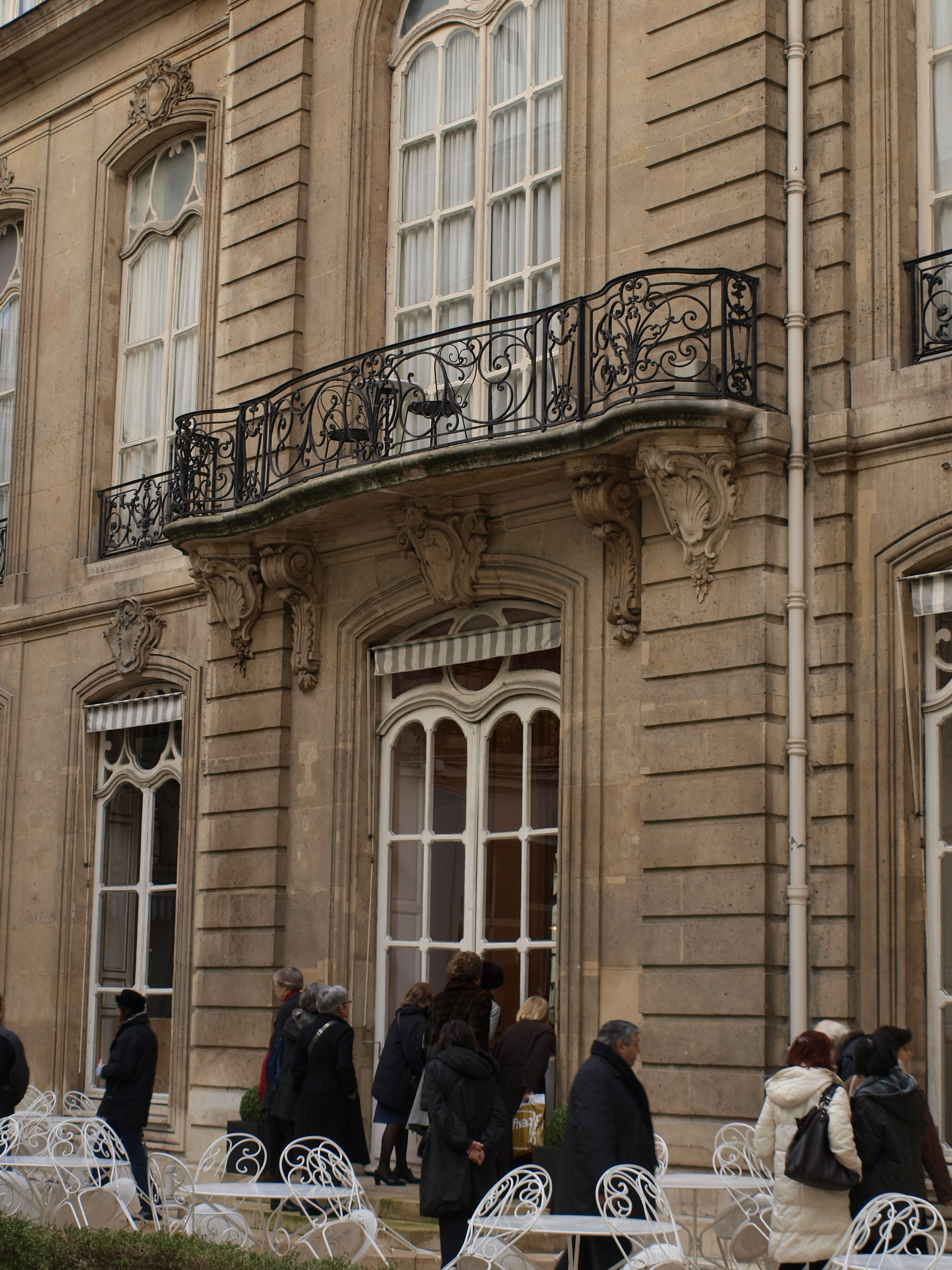 Façade l'hôtel Saint James & Alblany côté jardin